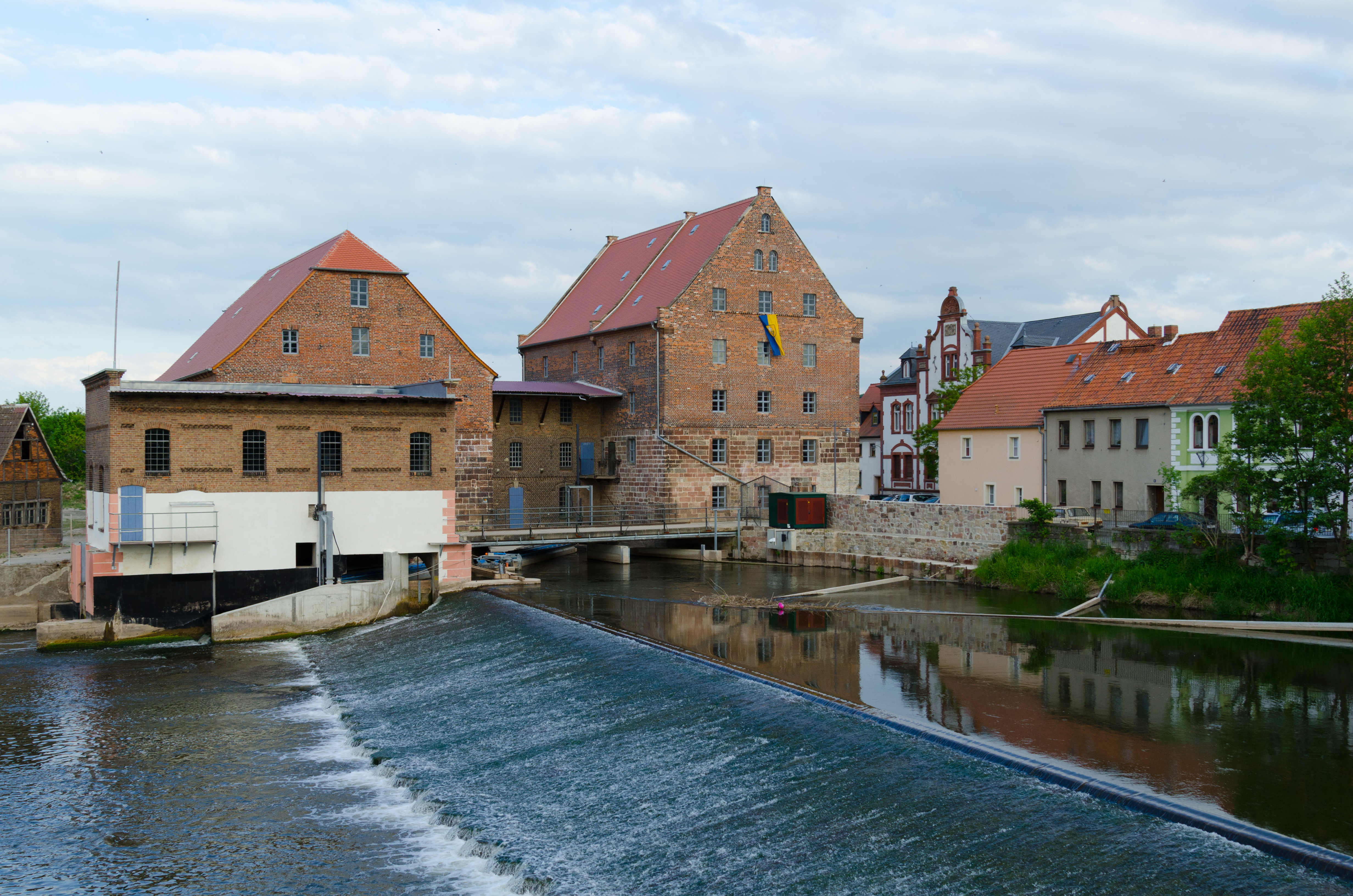 Laucha an der Unstrut, Mühlstraße 1, Tittel-Mühle